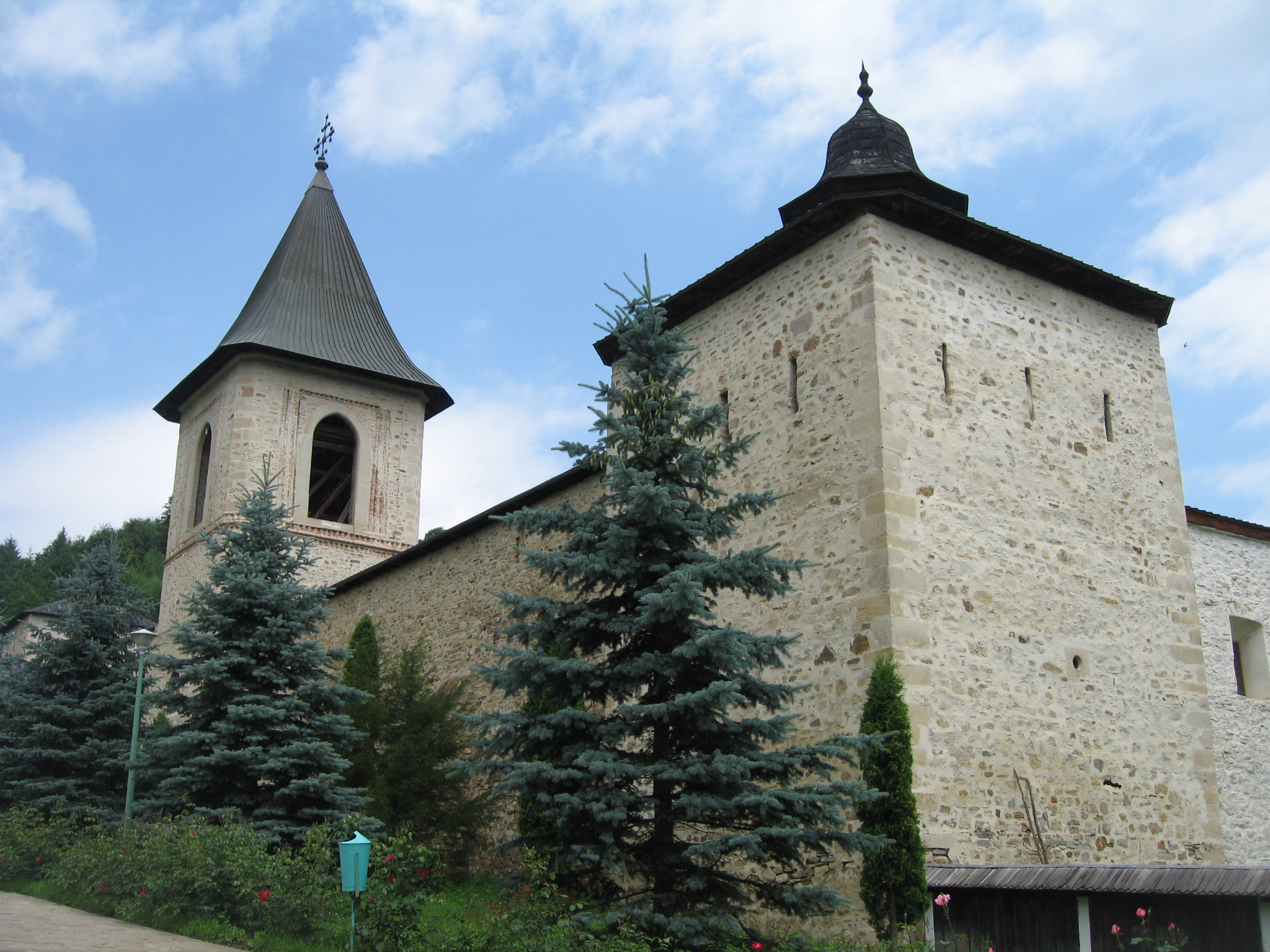 Mănăstirea Secu 07